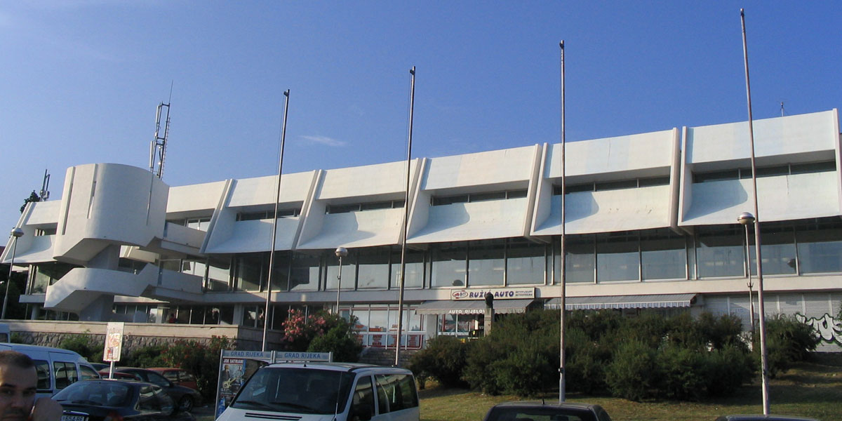 Sportska dvorana na Trsatu